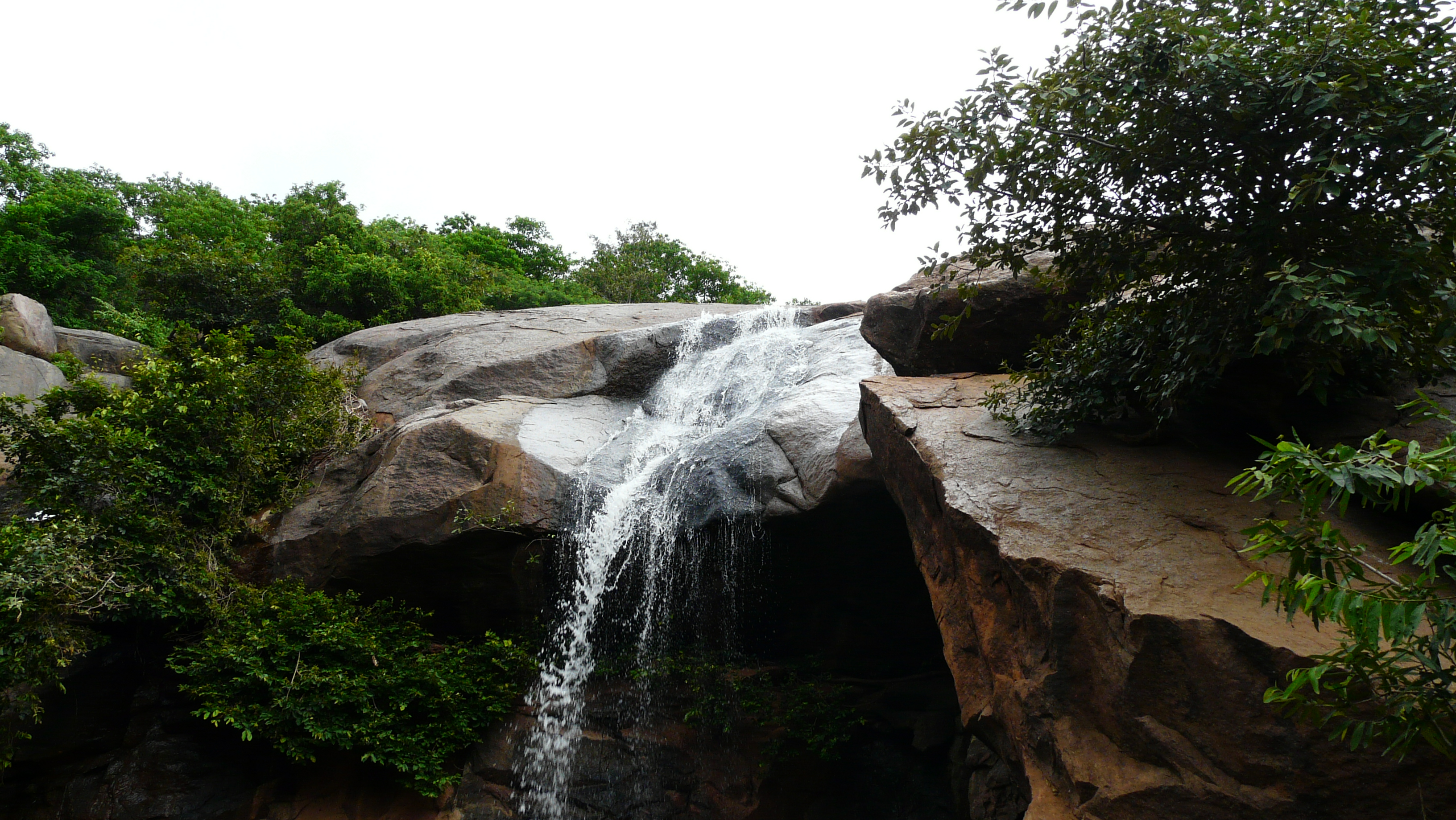 Jalagamparai Falls